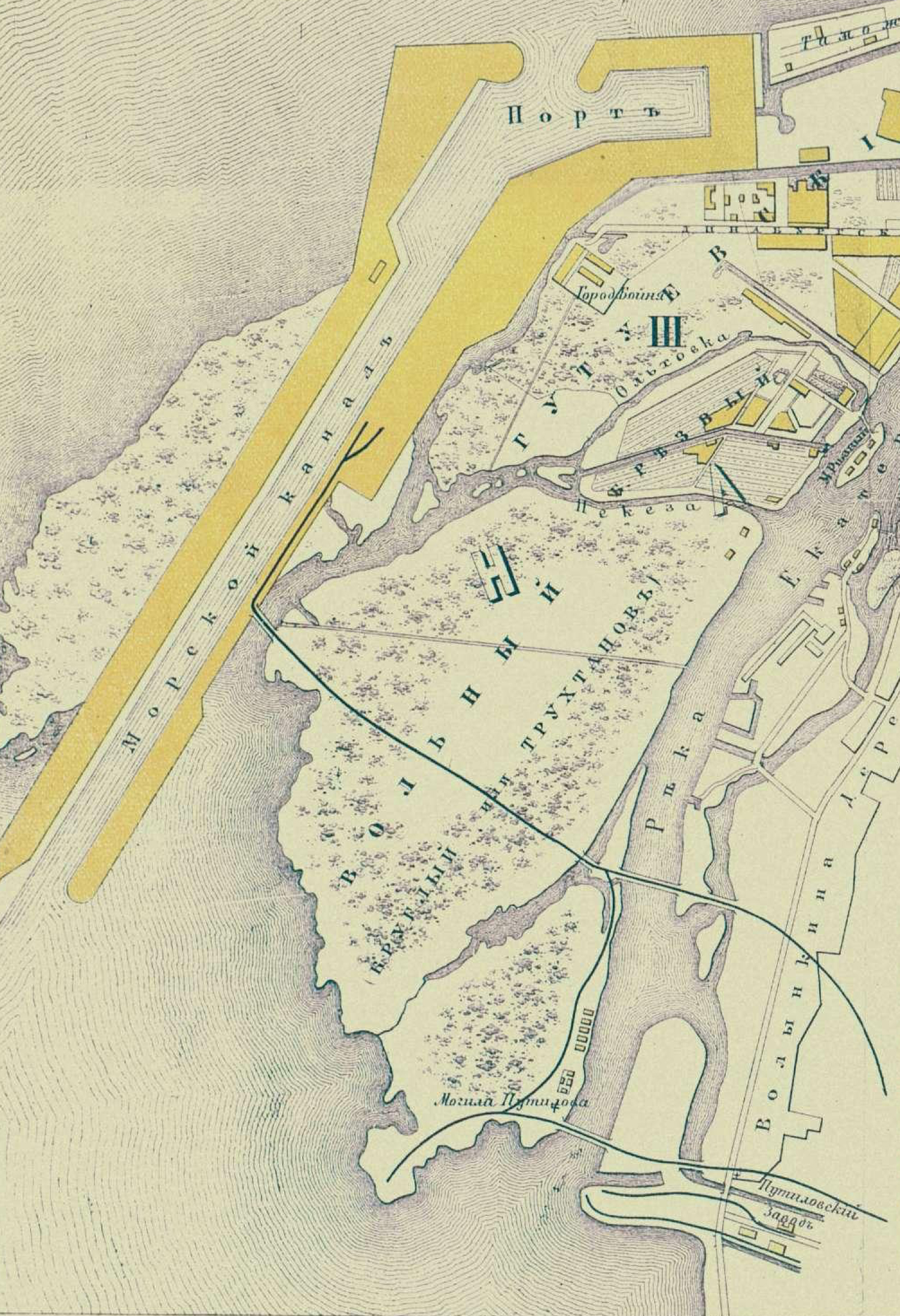 Могила Н. И. Путилова на фрагменте плана СПб 1888 года